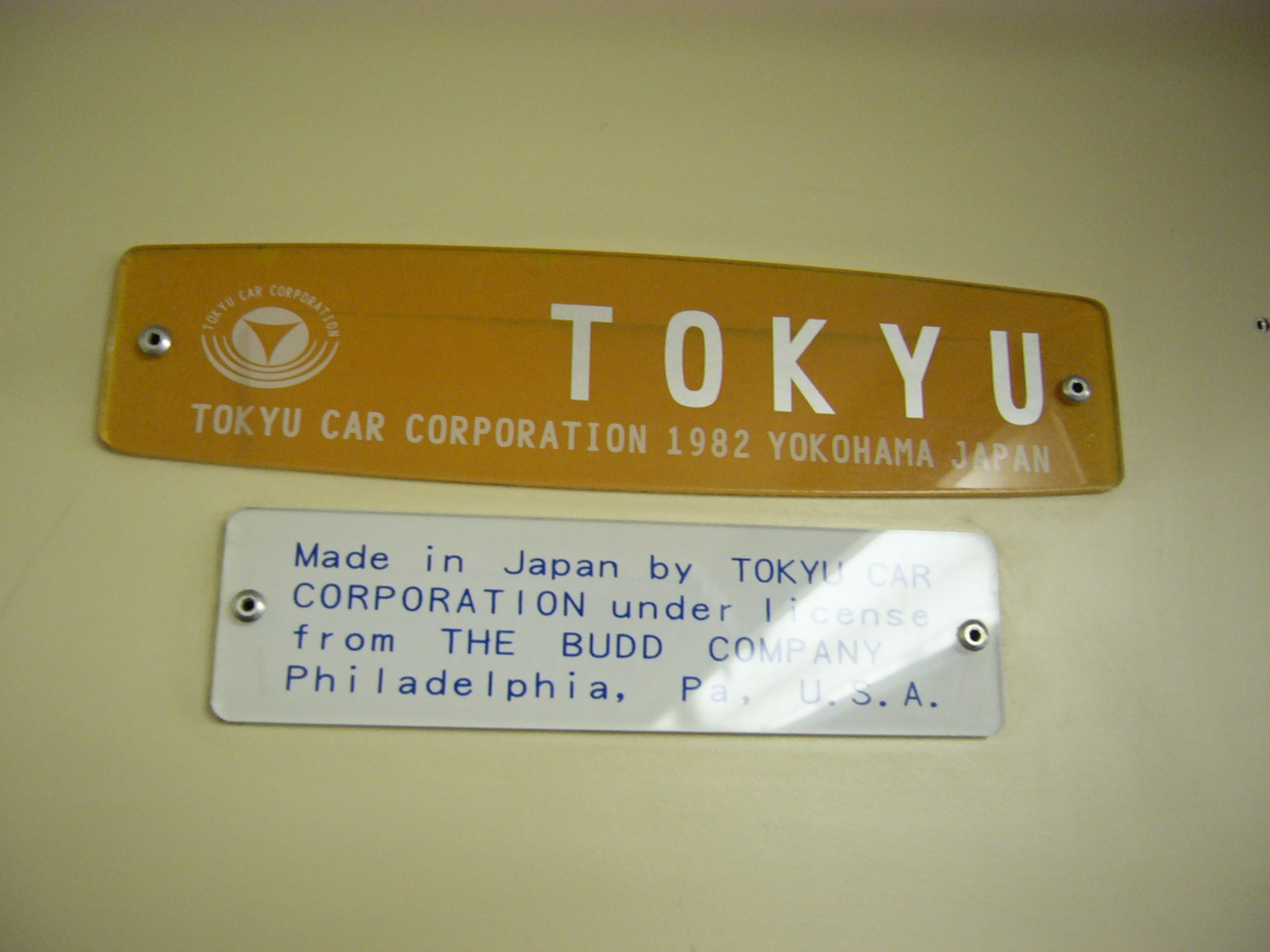 中文（台灣）: 臺灣鐵路管理局柴聯車DR2857車內，東急車輛銘板與巴德公司授權銘板。